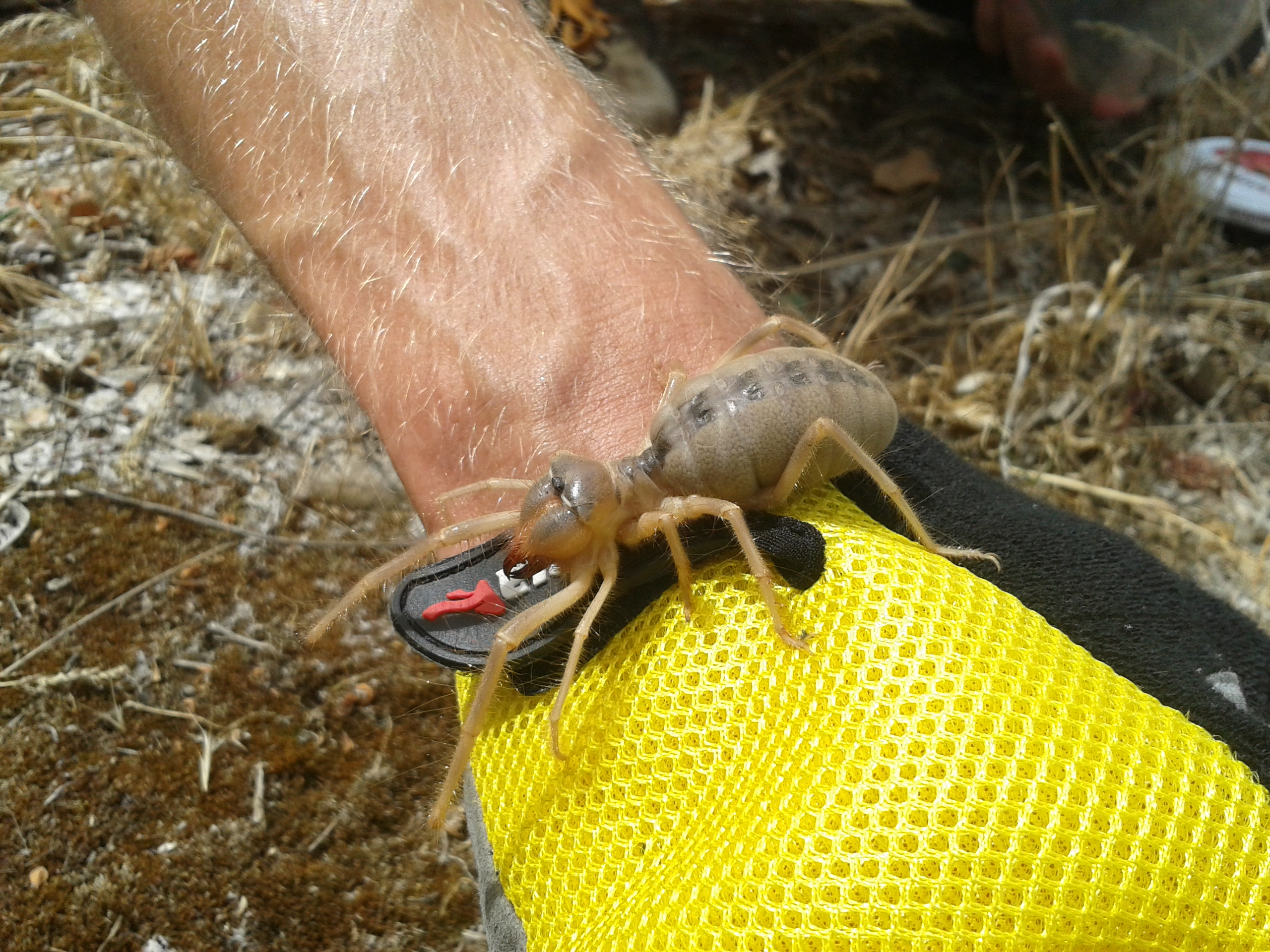 Сольпуга обыкновенная, 5 июля 2014 года